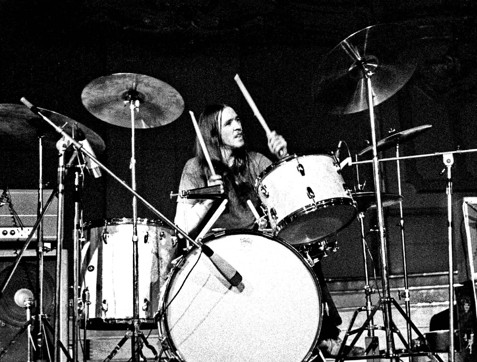 Rory Gallagher mit Gerry McAvoy (bs) und Rod de'Ath (dr), März 1973 , Musikhalle Hamburg